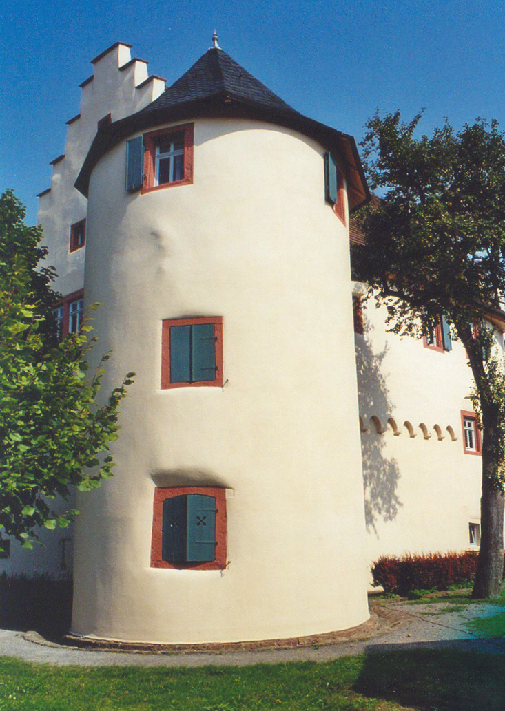 Das Dallauer Schloss: Eckturm und Palas blieben erhalten.